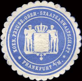 Sealing stamp Title: Koeniglich Preussische Ober - Staatsanwaltschaft - Frankfurt am Main Description: hellblau, weiß, geprägt Place: Frankfurt / Main size: 4 cm